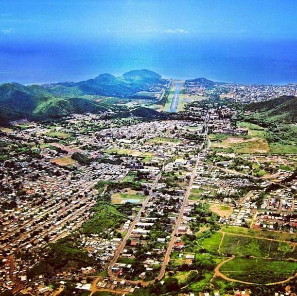 imagen de la ciudad de carupano venezuela desde el cerro de maturincito